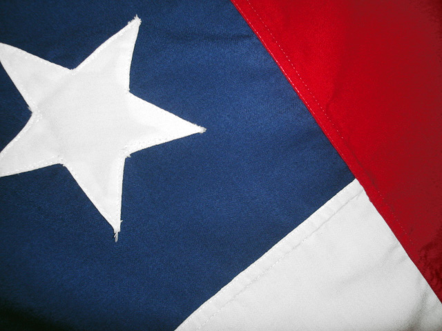 Imagen de una bandera chilena